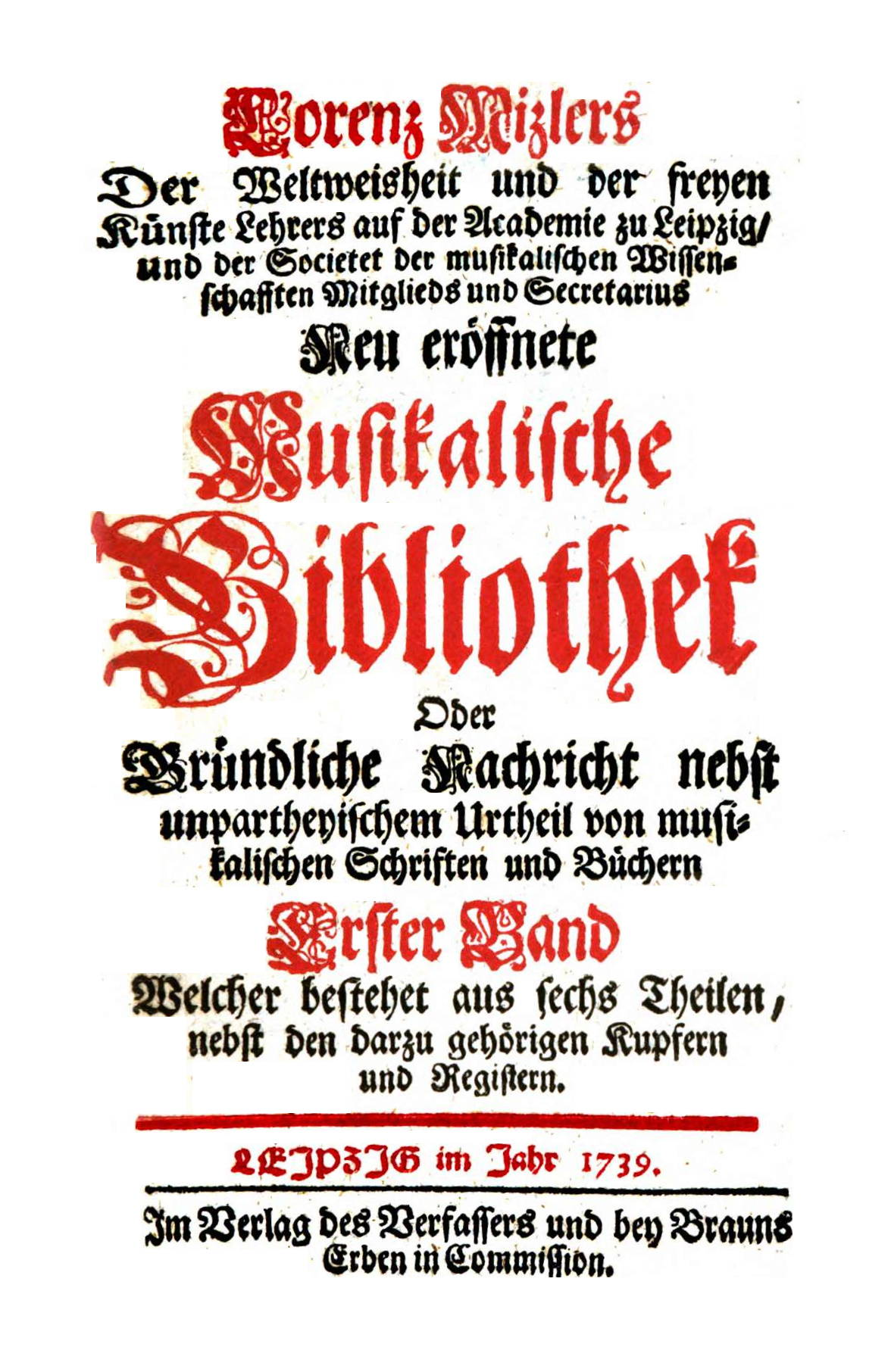 Titelseite der Zeitschrift / Title page of the periodical.